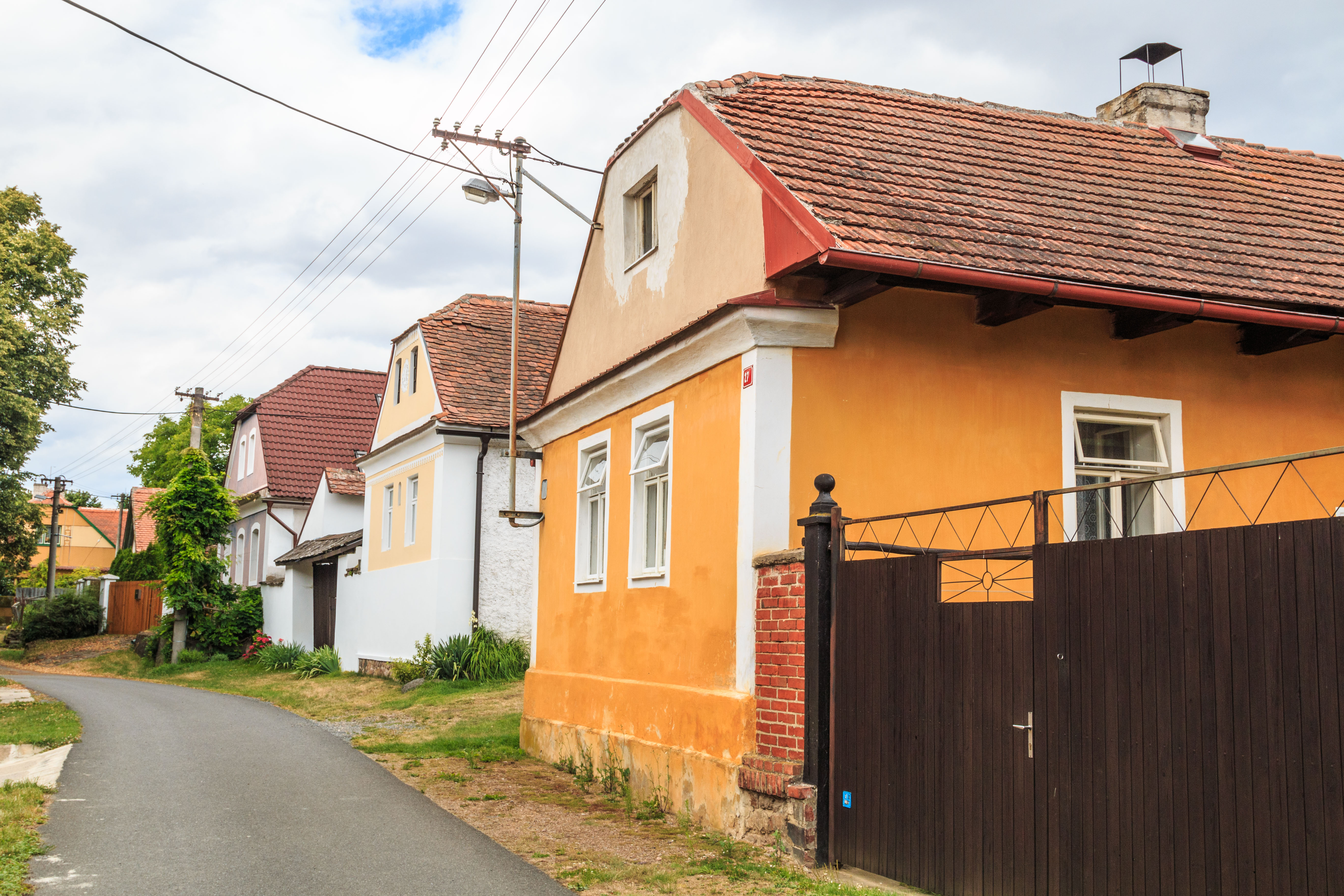 Moravany u Ronova nad Doubravou čp. 27